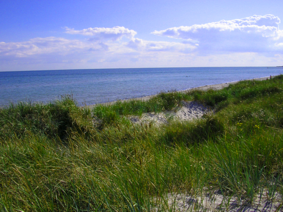 Falsterbo beach